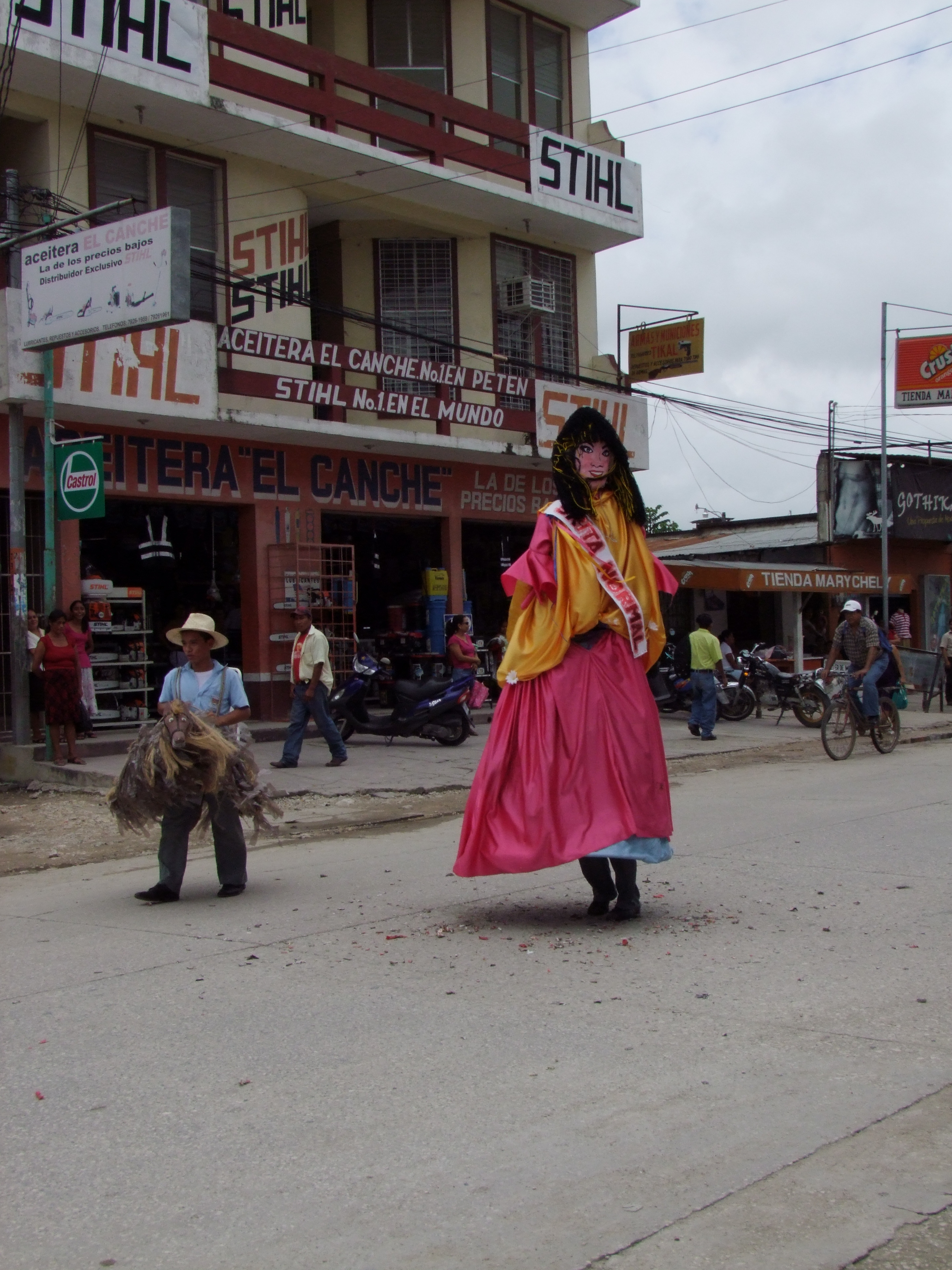 Baile de la Chatona